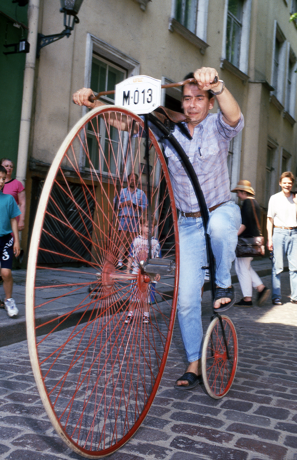 Jaan Rõõmussaar, ajakirjanik ja endine näitleja 94